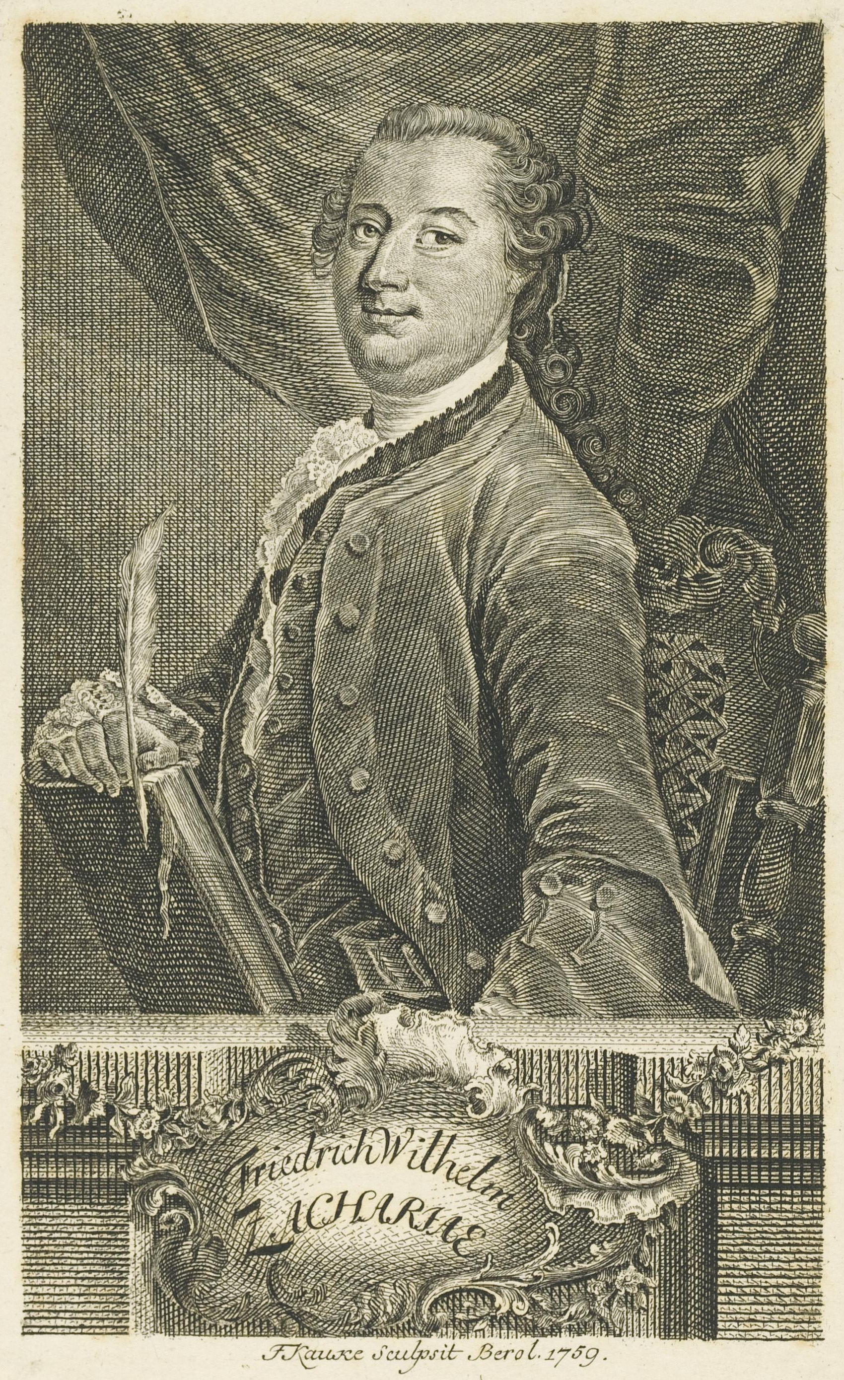 Portrait von Friedrich Wilhelm Zachariae, Kupferstich von Friedrich Kauke aus dem Jahre 1759, 166 mal 102 Millimeter